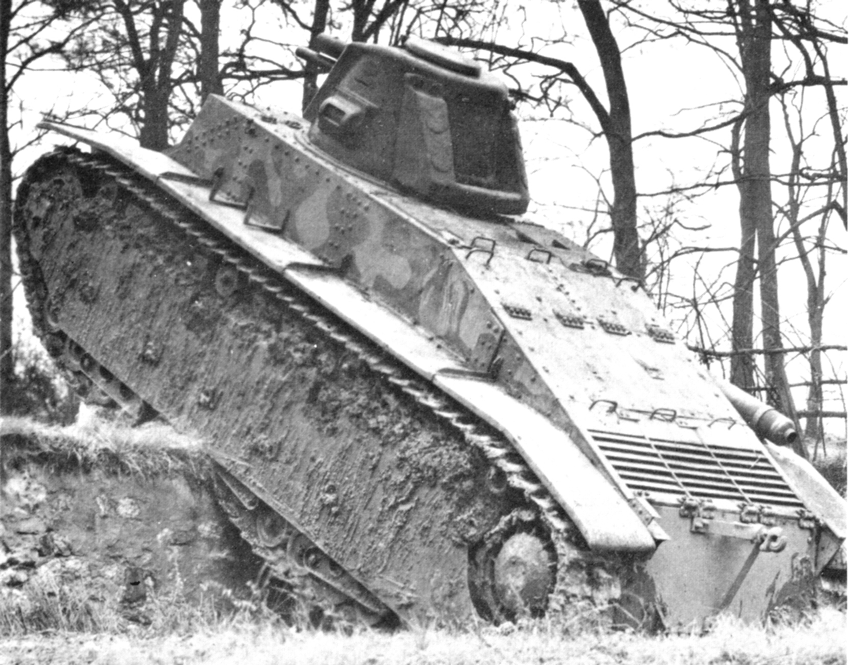 Digitale reproductie foto van het prototype van de Char D2, uitgerust met de ST3 toren